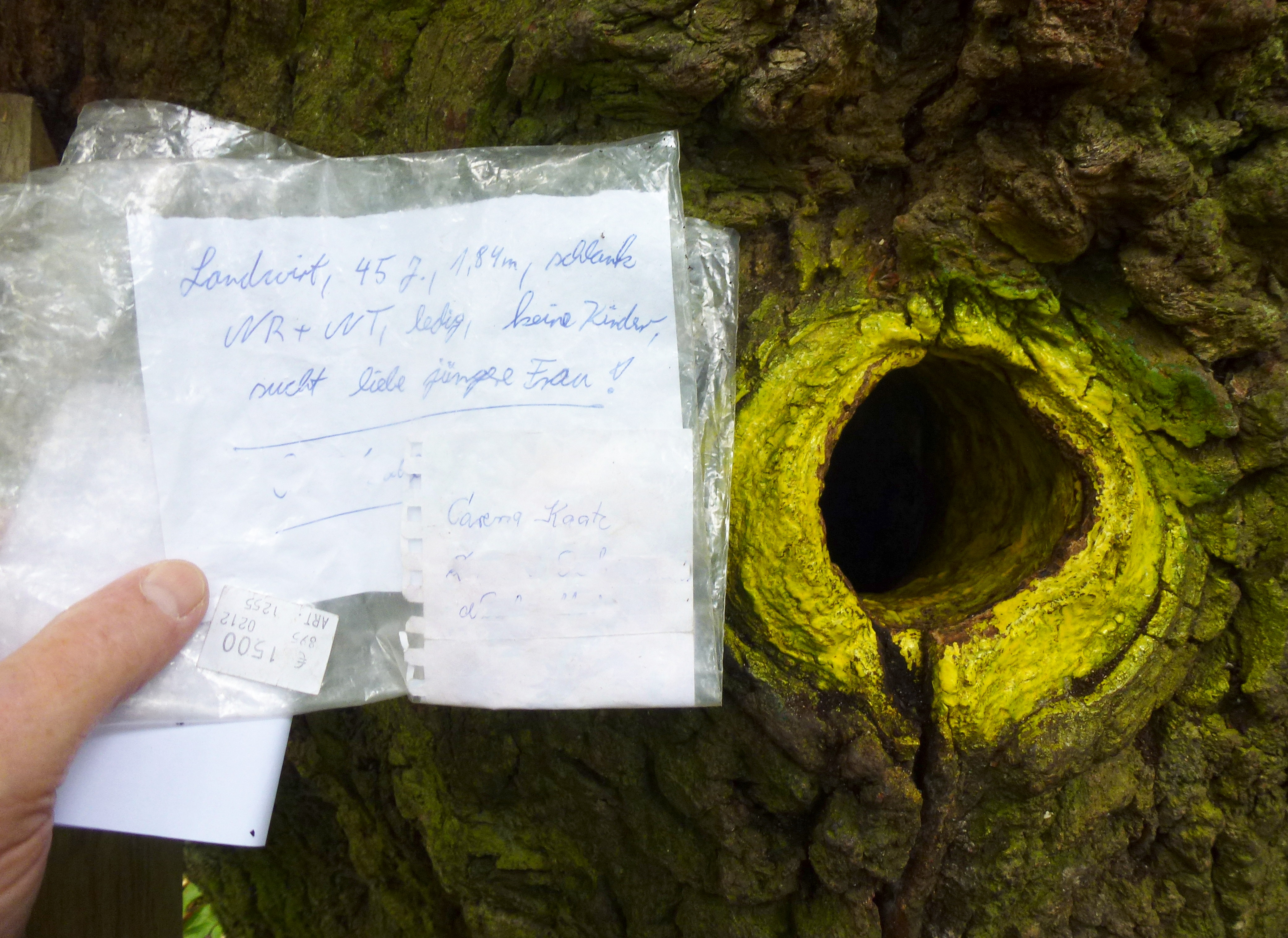 Die Bräutigamseiche im Dodauer Forst bei Eutin in Schleswig-Holstein.